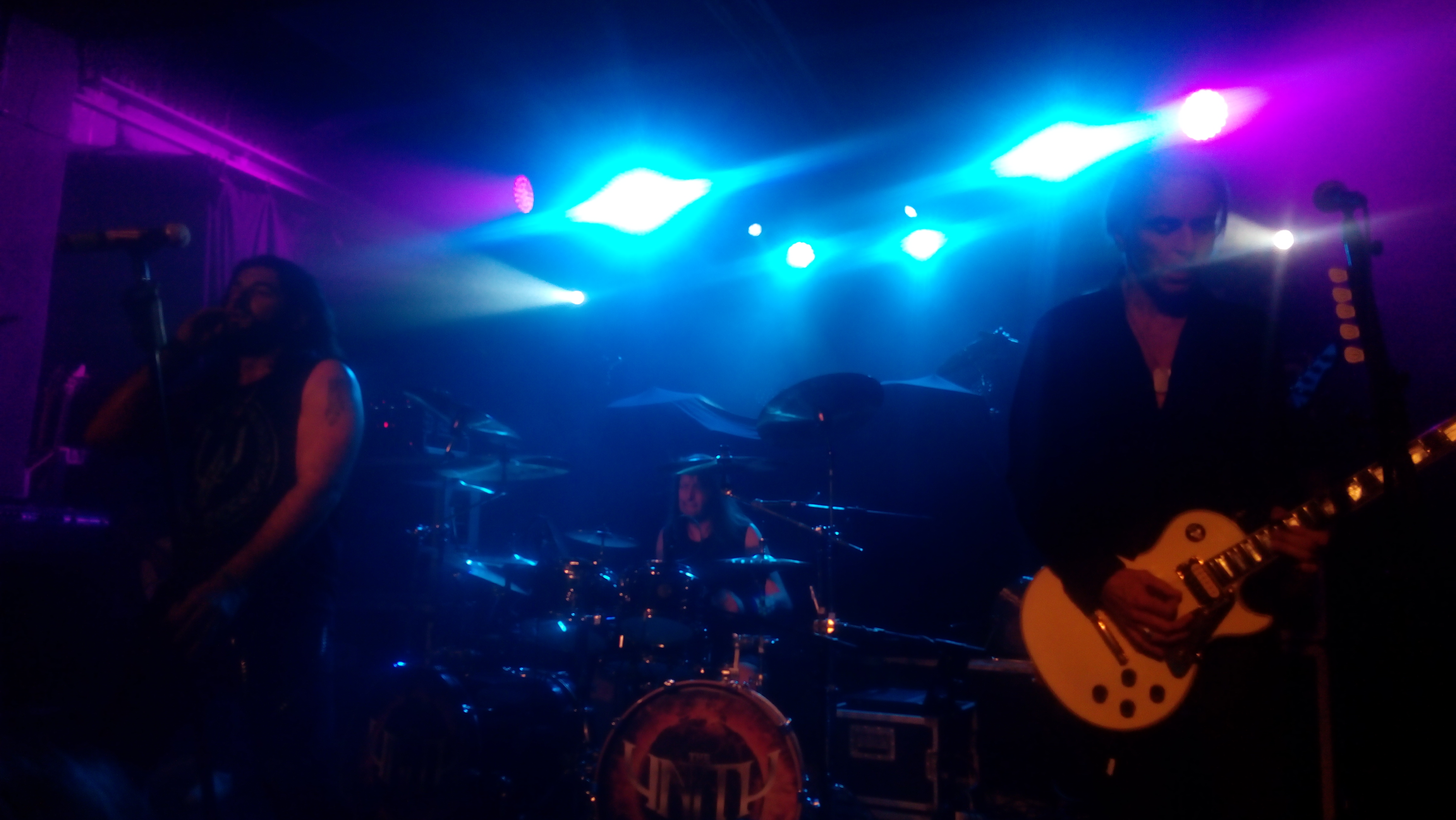 The Unity, Praha, 2. 10. 2017